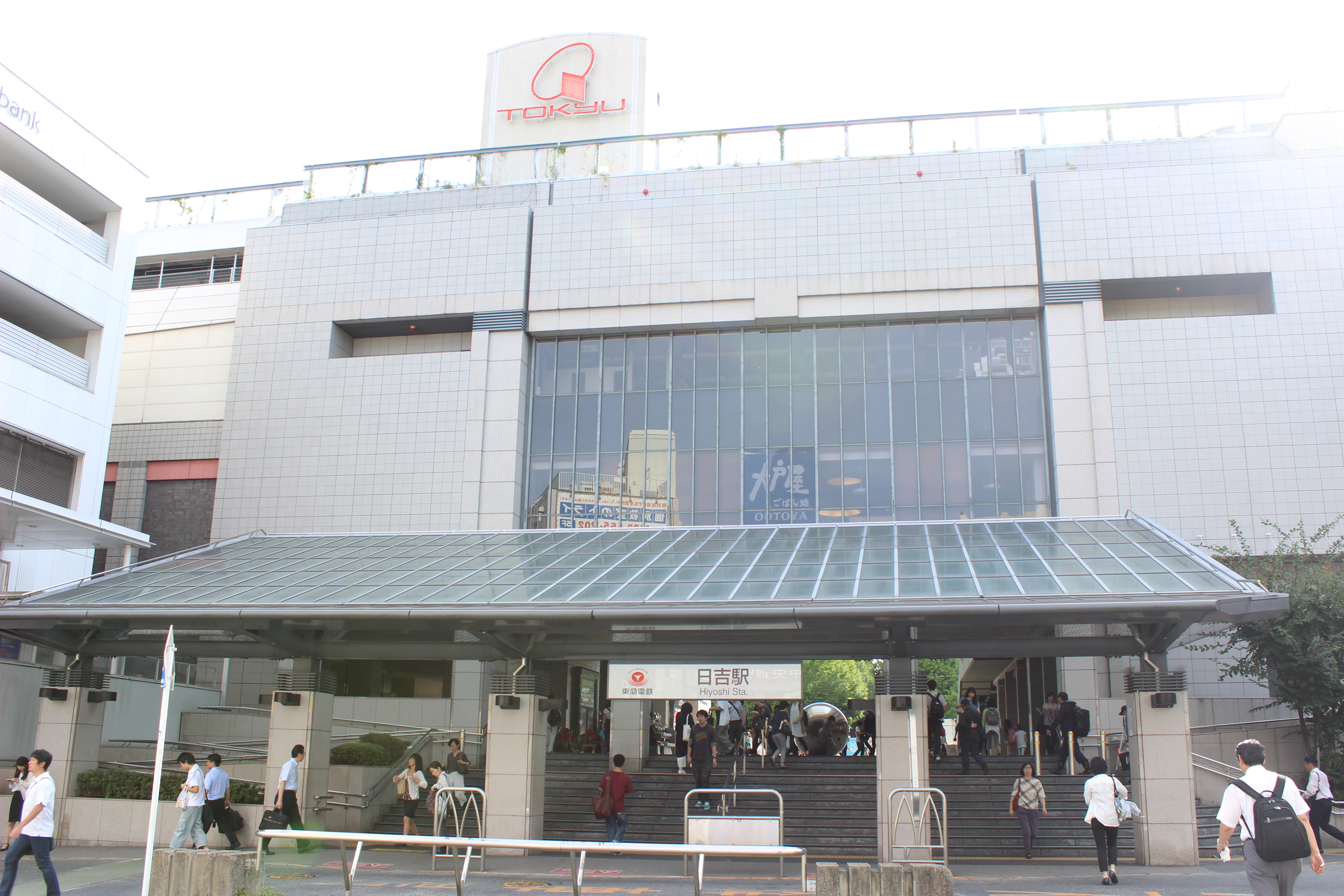 東急日吉駅日吉商店街側出口